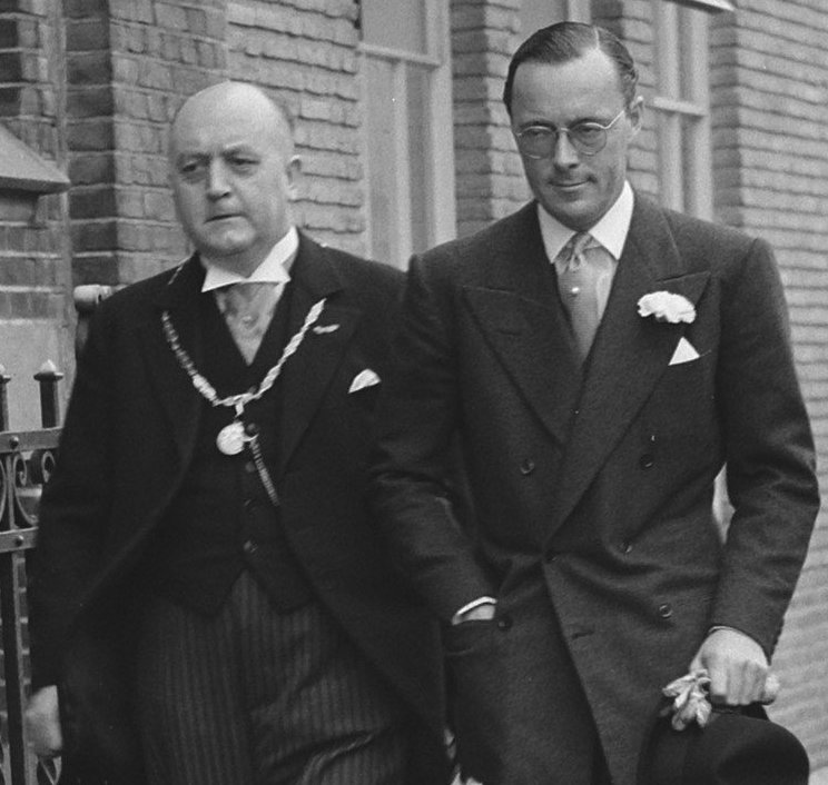 Collectie / Archief : Fotocollectie Anefo Reportage / Serie : [ onbekend ] Beschrijving : Prins Bernhard in Veenendaal Datum : 25 mei 1949 Locatie : Utrecht, Veenendaal Persoonsnaam : Bernhard, prins Fotograaf : Winterbergen, […] / Anefo Auteursrechthebbende : Nationaal Archief Materiaalsoort : Glasnegatief Nummer archiefinventaris : bekijk toegang 2.24.01.09 Bestanddeelnummer : 903-3946